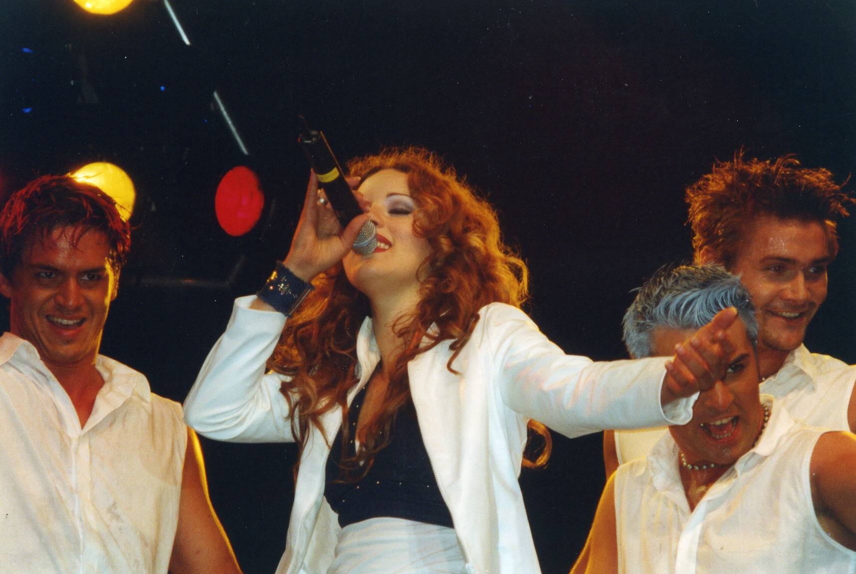 Bildbeschreibung: Blümchen; Auftritt in Sangerhausen Quelle: eigenes Foto Fotograf/Zeichner: Daniel Rose Datum: 23. Juni 2000 Sonstiges: bürgerlicher Name: Jasmin Wagner